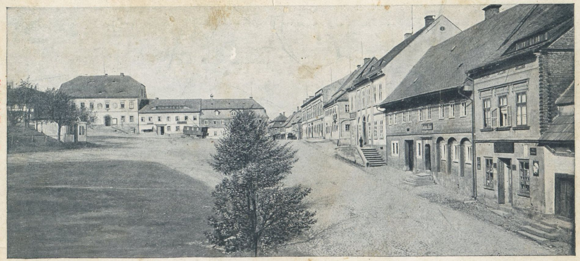 Náměstí v Jiřetíně koncem 19. století